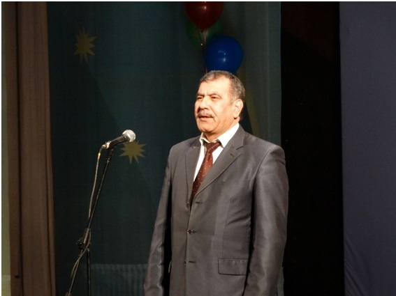 Həsən_Qasımov_(Rəsul_oğlu)